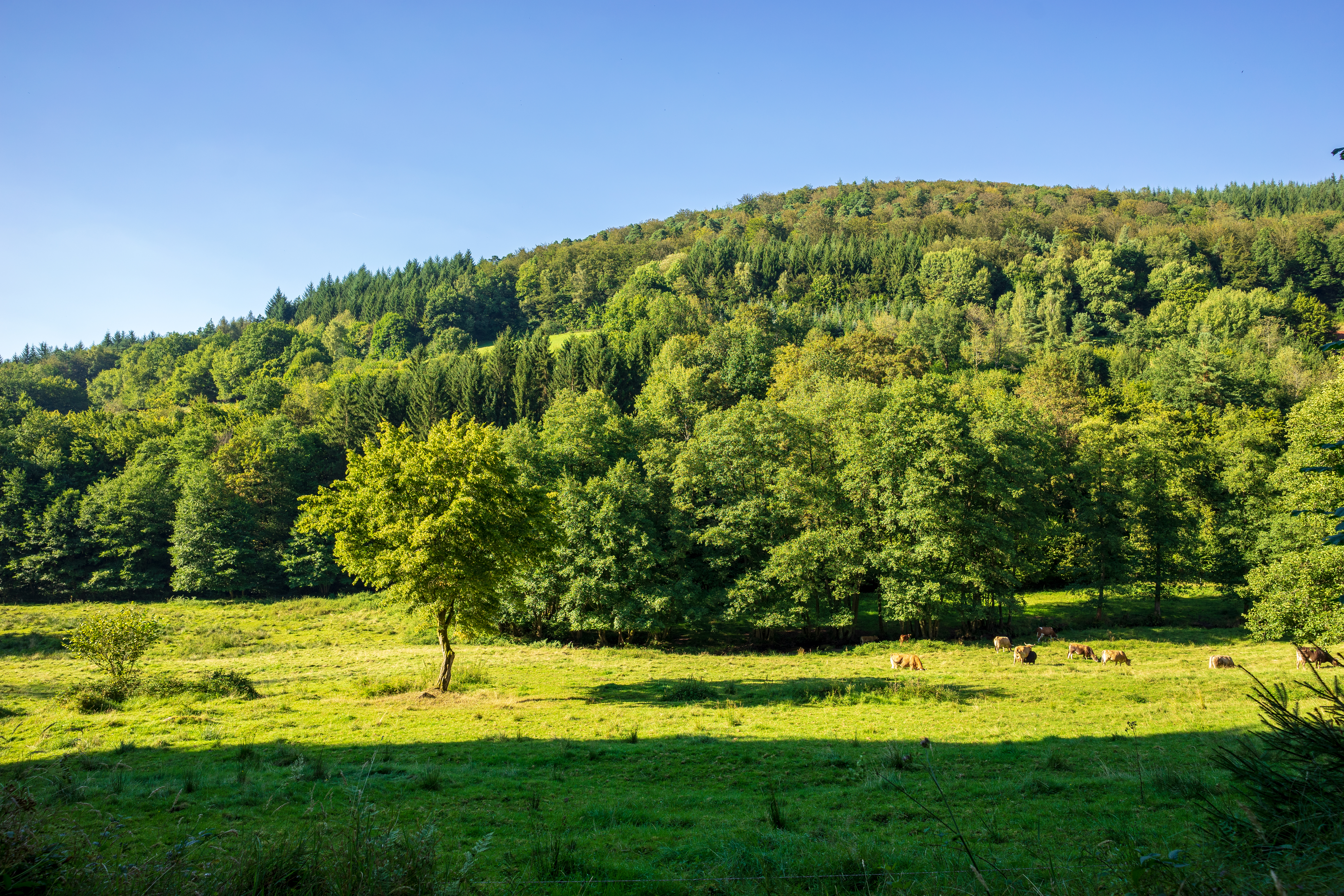 Malerische Weide im tiefen Reisenbachtal westlich des Weilers Reisenbacher Grund bei Mudau, Neckar-Odenwald-Kreis Gehört zum Landschaftsschutzgebiet „Reisenbachtal“, Schutzgebiets-Nr. 2.25.001.